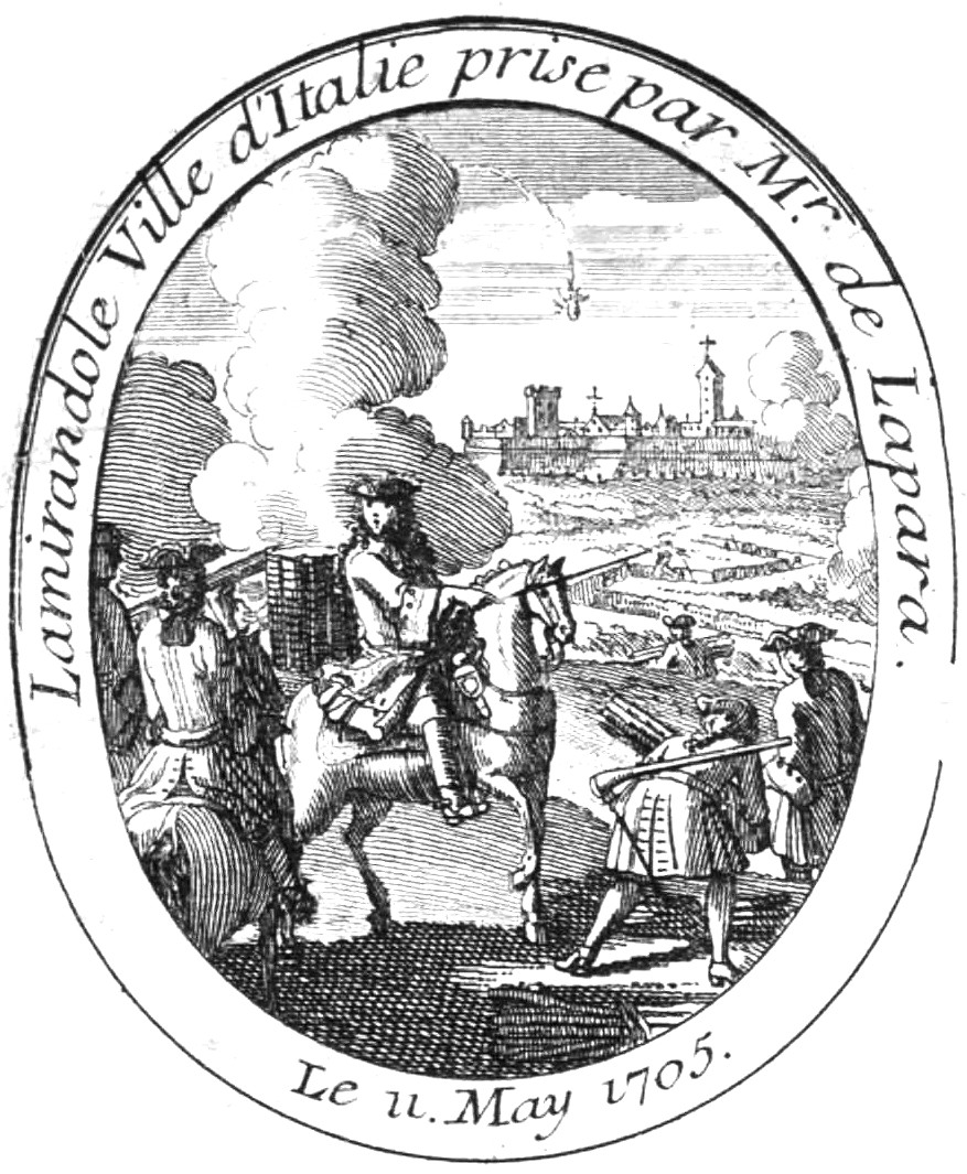 La presa di Mirandola da parte di De Lapara dell'11 maggio 1705 (particolare dell'Almanacco per l'anno 1706 raffigurante le vittorie riportate dalle armate francesi in Italia nel corso della campagna del 1705: battaglia di Cassano d'Adda, prese di Verrua, Mirandola, Chivasso, Nizza e dei forti di Saint-Ospice e Montalban)